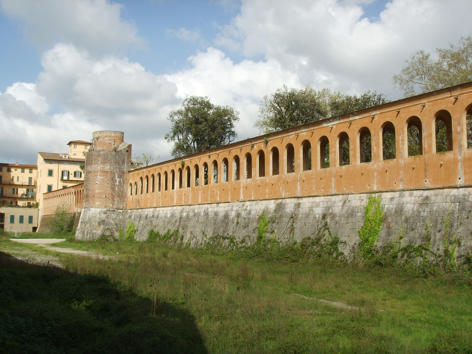 Giardino di Scotto, galleria